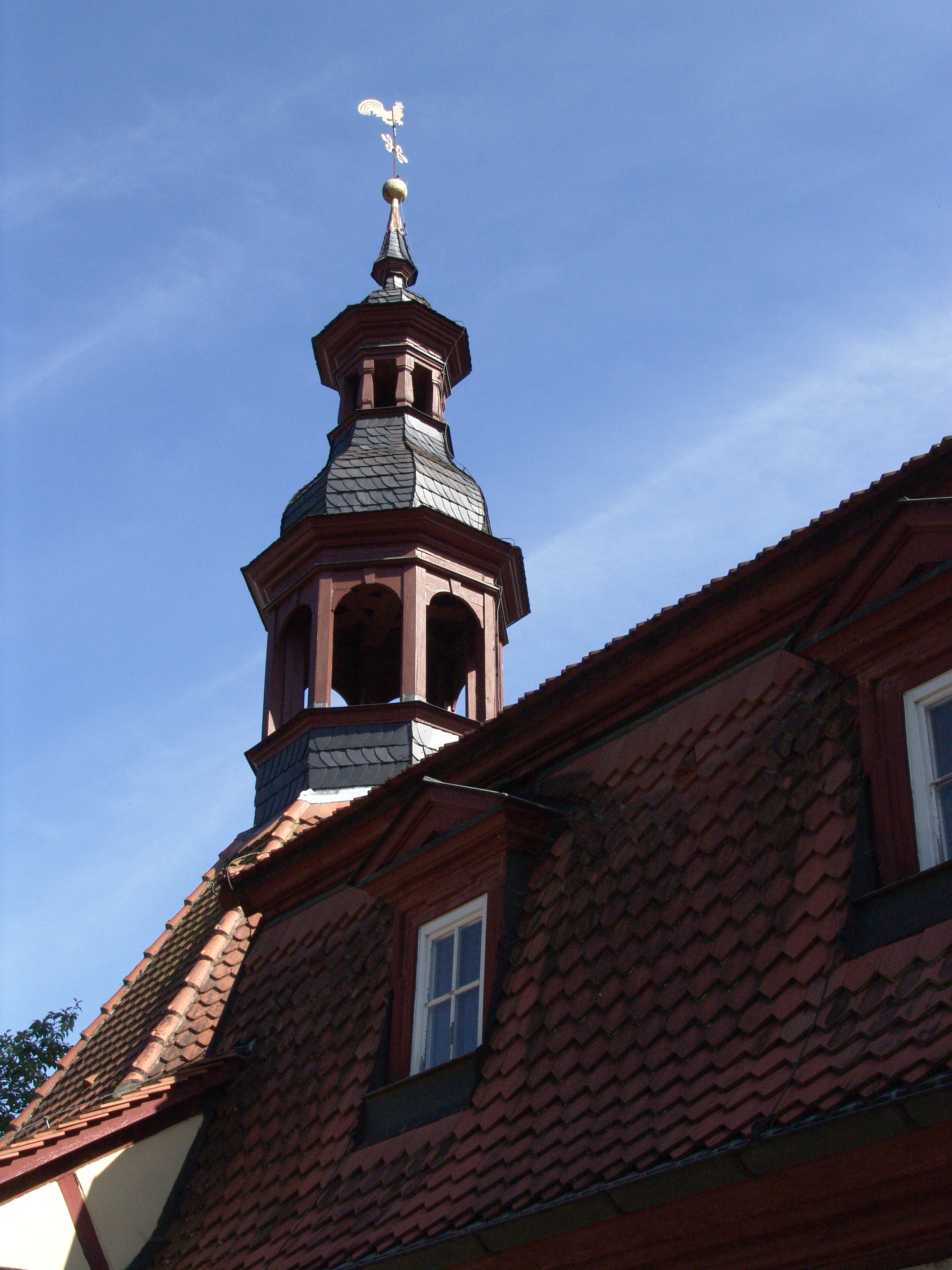 Obersteinbach St. Rochus